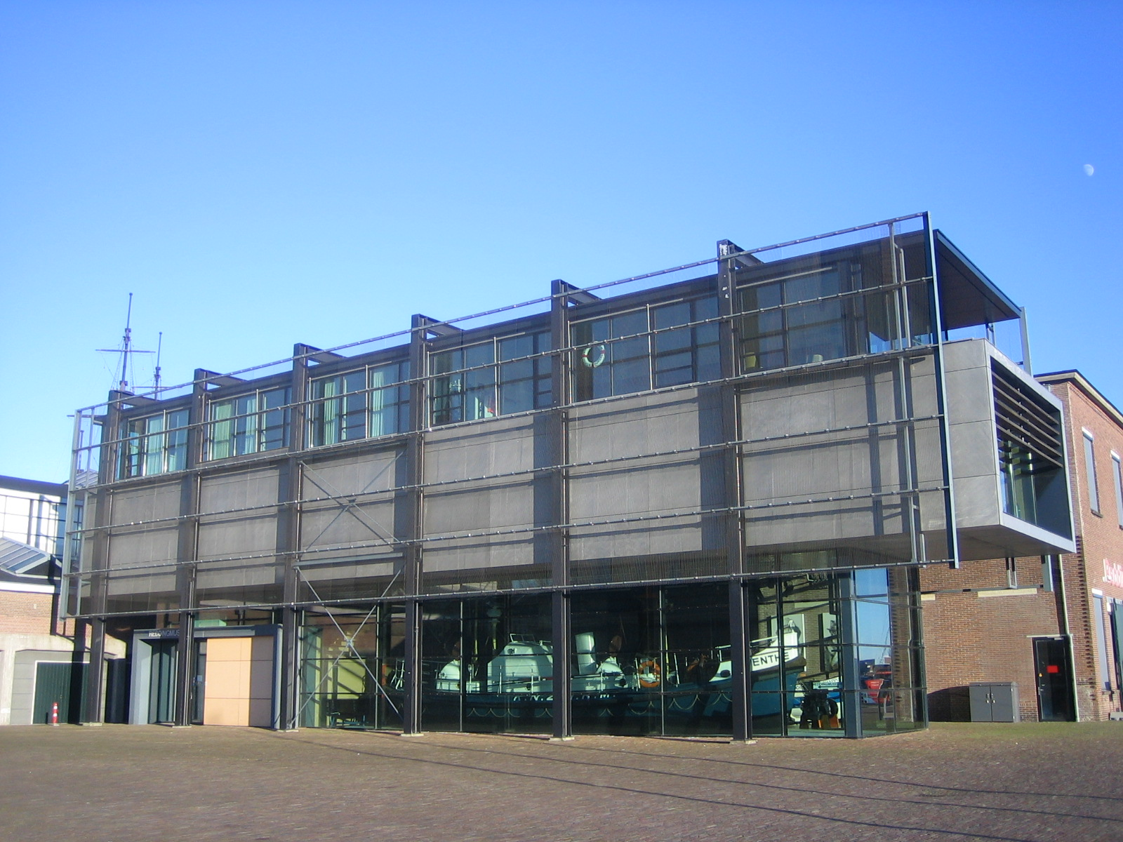 Moderne aanbouw Reddingmuseum